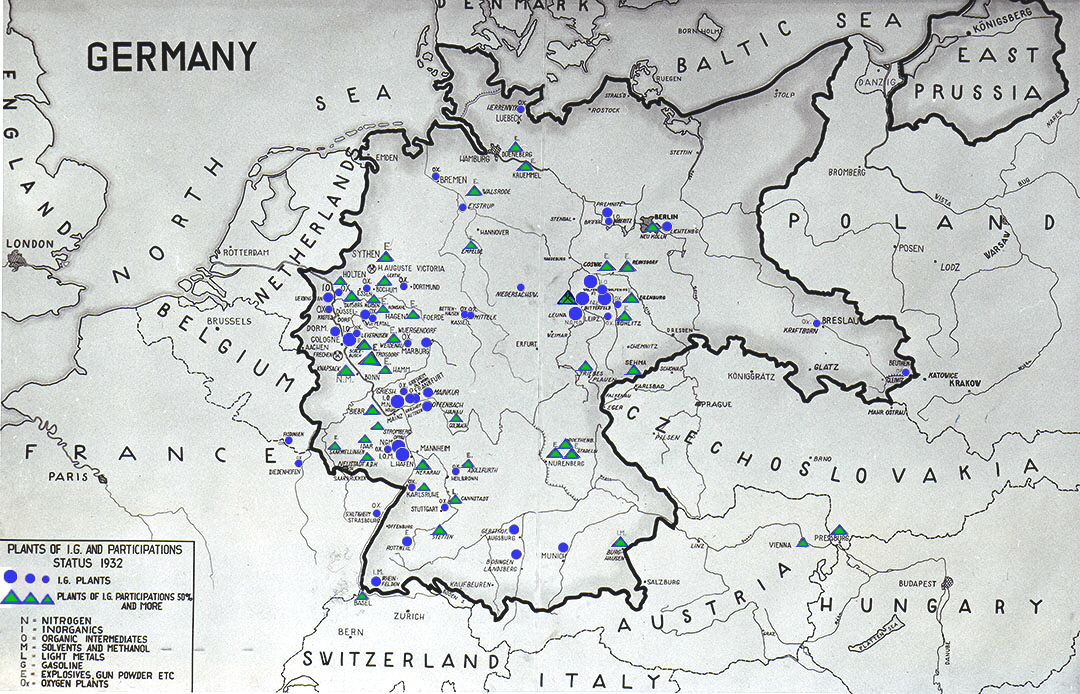 Werke und Betriebe der IG Farben 1932 (Ende der Weimarer Republik)